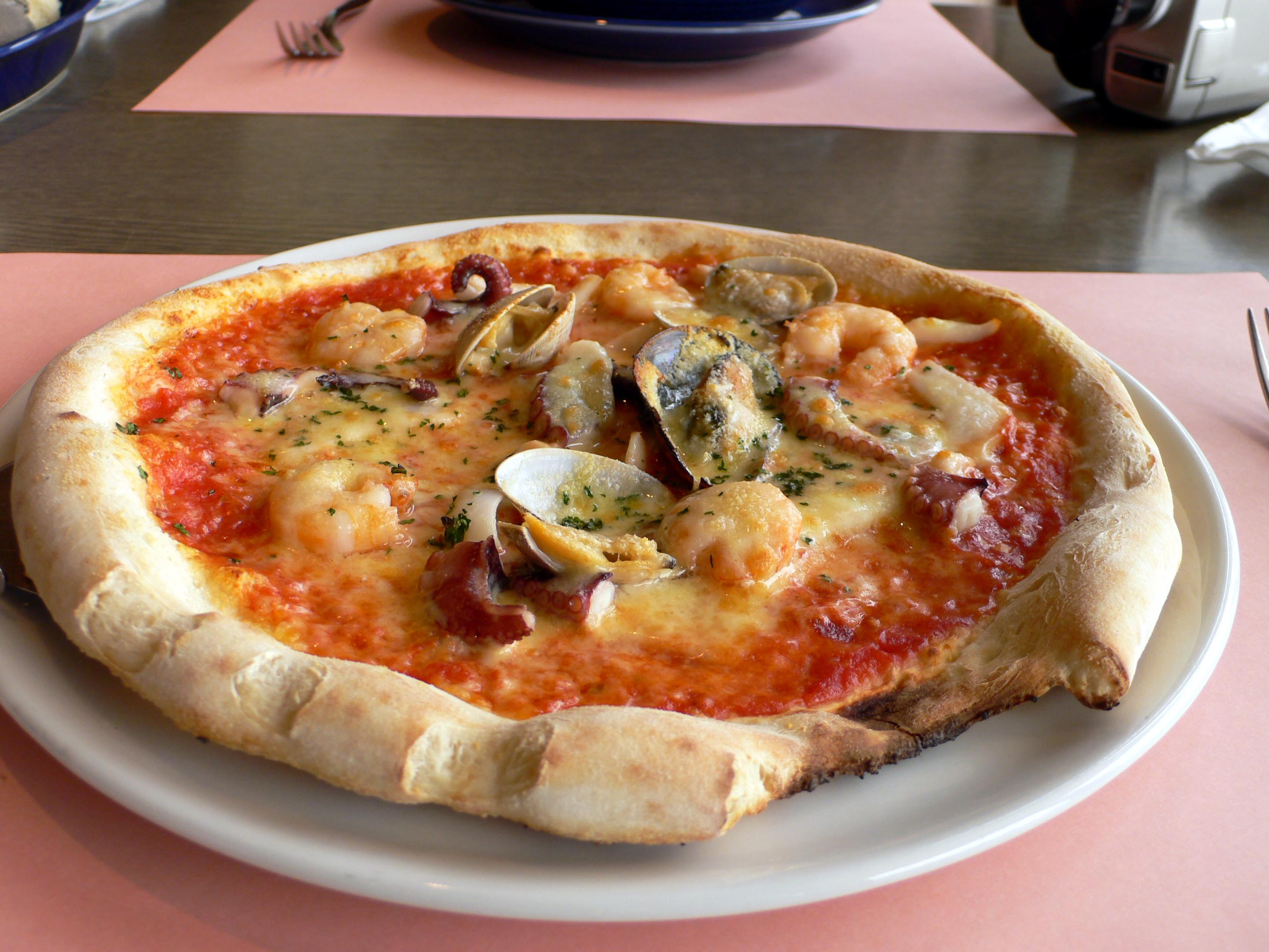 海鮮トマトピッツァ